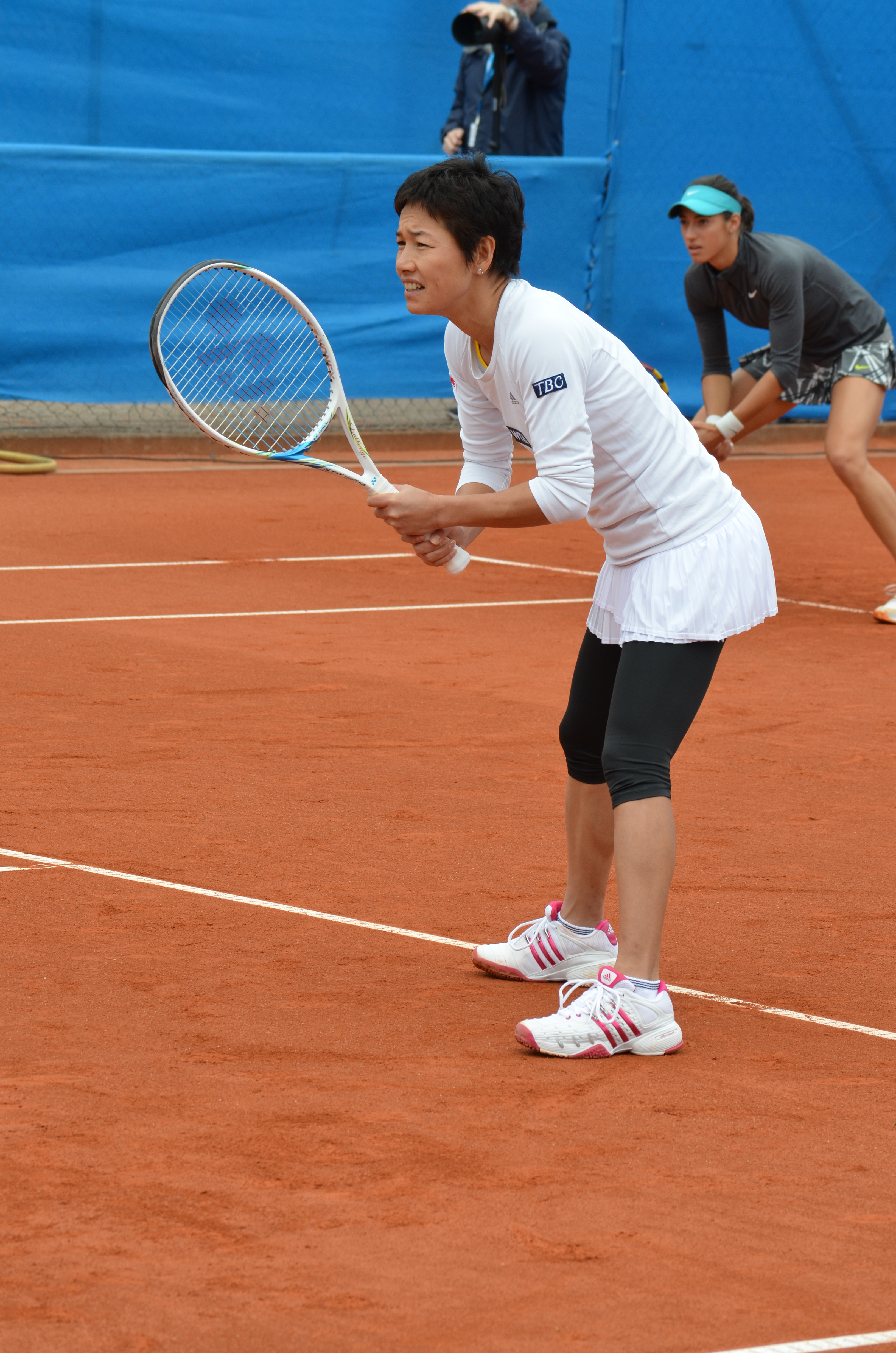 Kimiko Date-Krumm und Caroline Garcia in der Erstrundenbegegnung der Doppelkonkurrenz gegen Marina Melnikova und Teodora Mircic beim Nürnberger Versicherungscup 2014